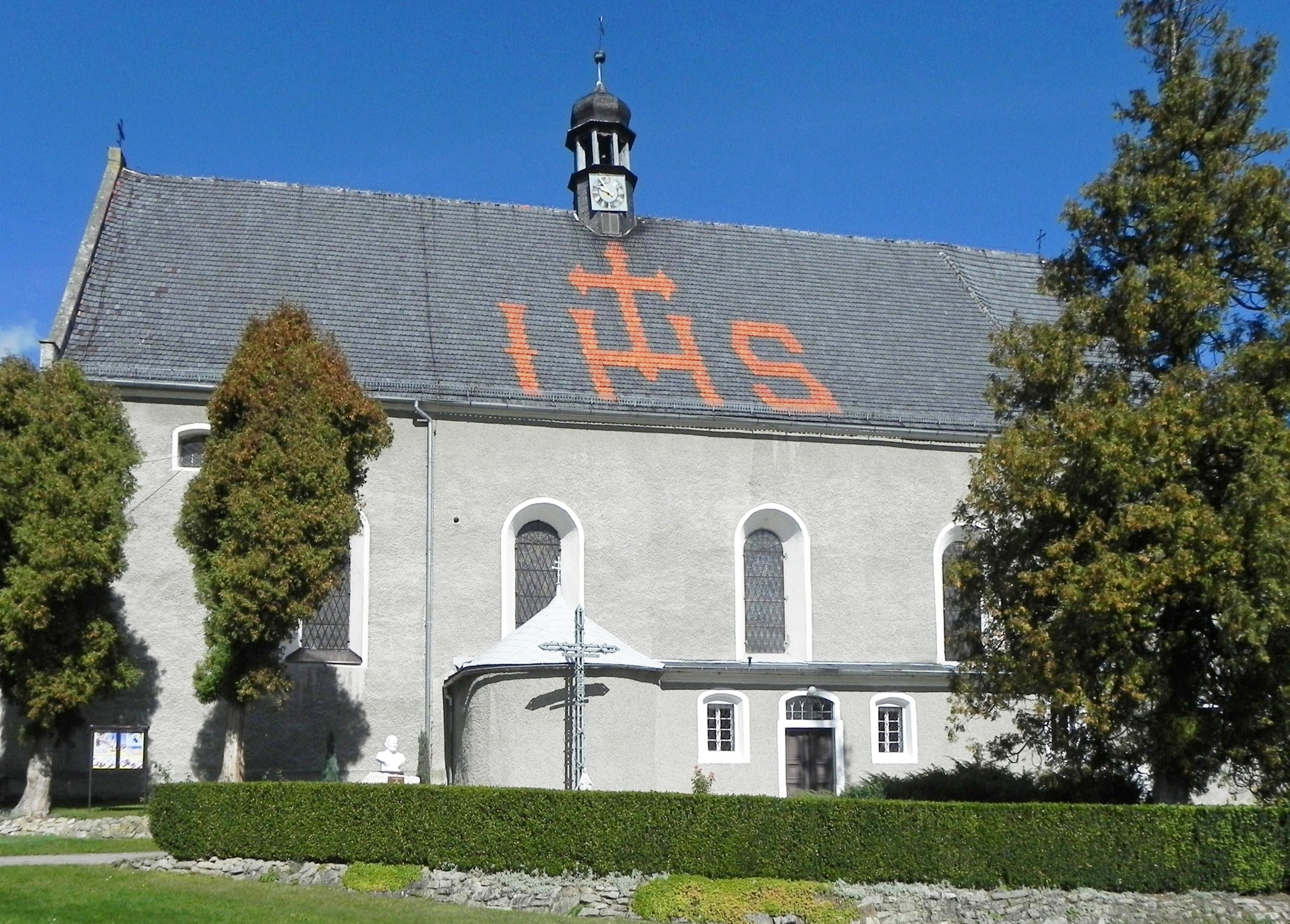 zespół kościoła par. p.w. św. Jerzego, 2 poł. XIV, 1765: - kościół, - dzwonnica, 1683, - mur obronny cmentarza, 1 poł. XV, - kaplica, XVIII/XIX, - budynek bramny, XV Szalejów Górny 03.1960.